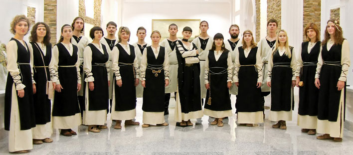 Воскресный хор